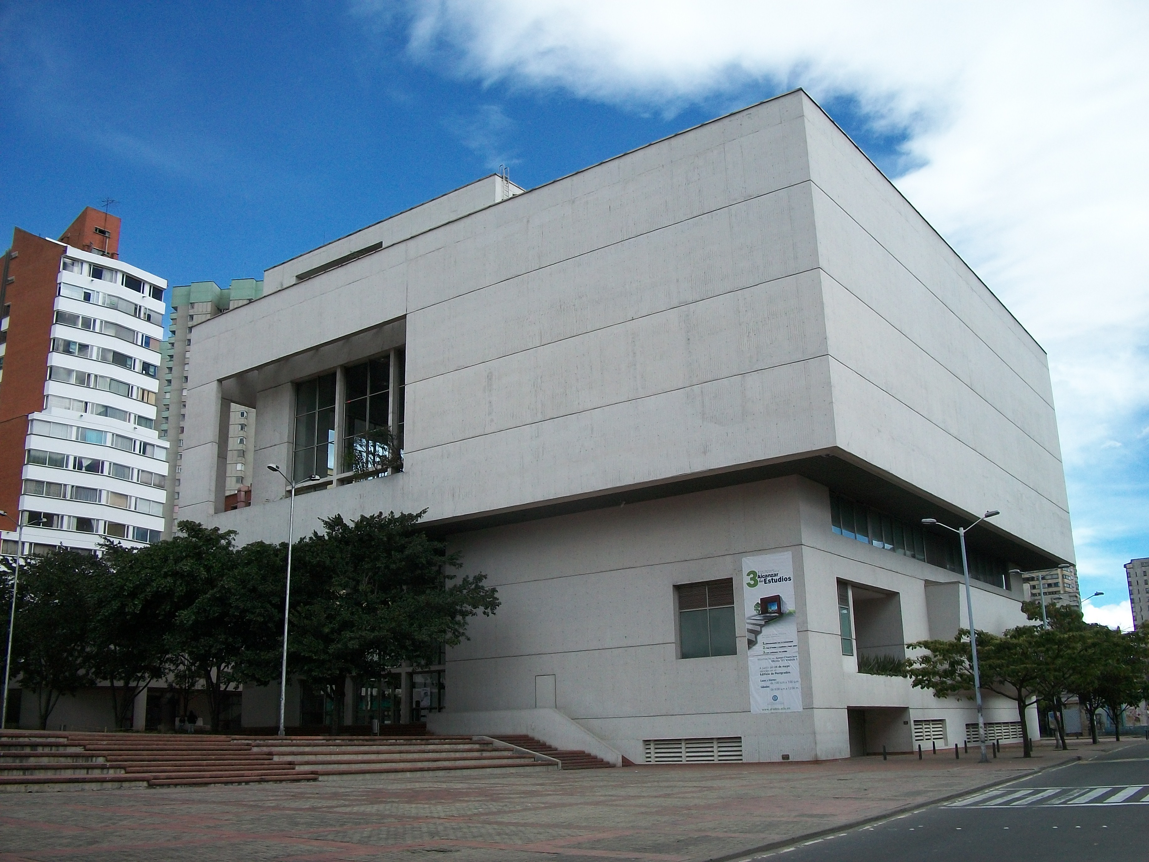 Auditorio y hemeroteca de la Universidad Jorge Tadeo Lozano, Bogotá. Carrera 4 No. 22-40.